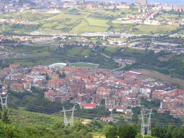 Trapagaran Zugastietatik ikusia.